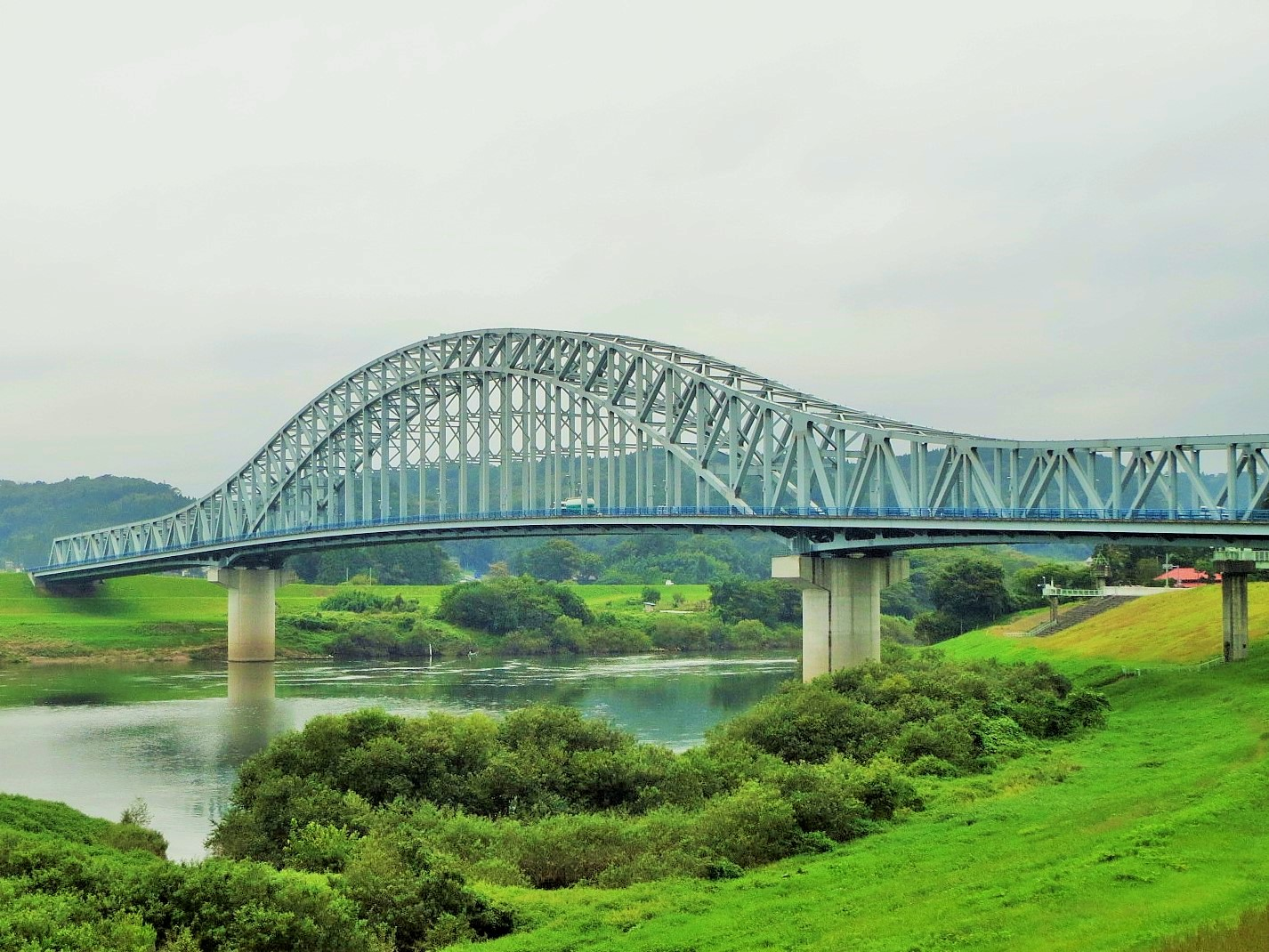 一関市に架かる北上大橋 Canon IXY 3